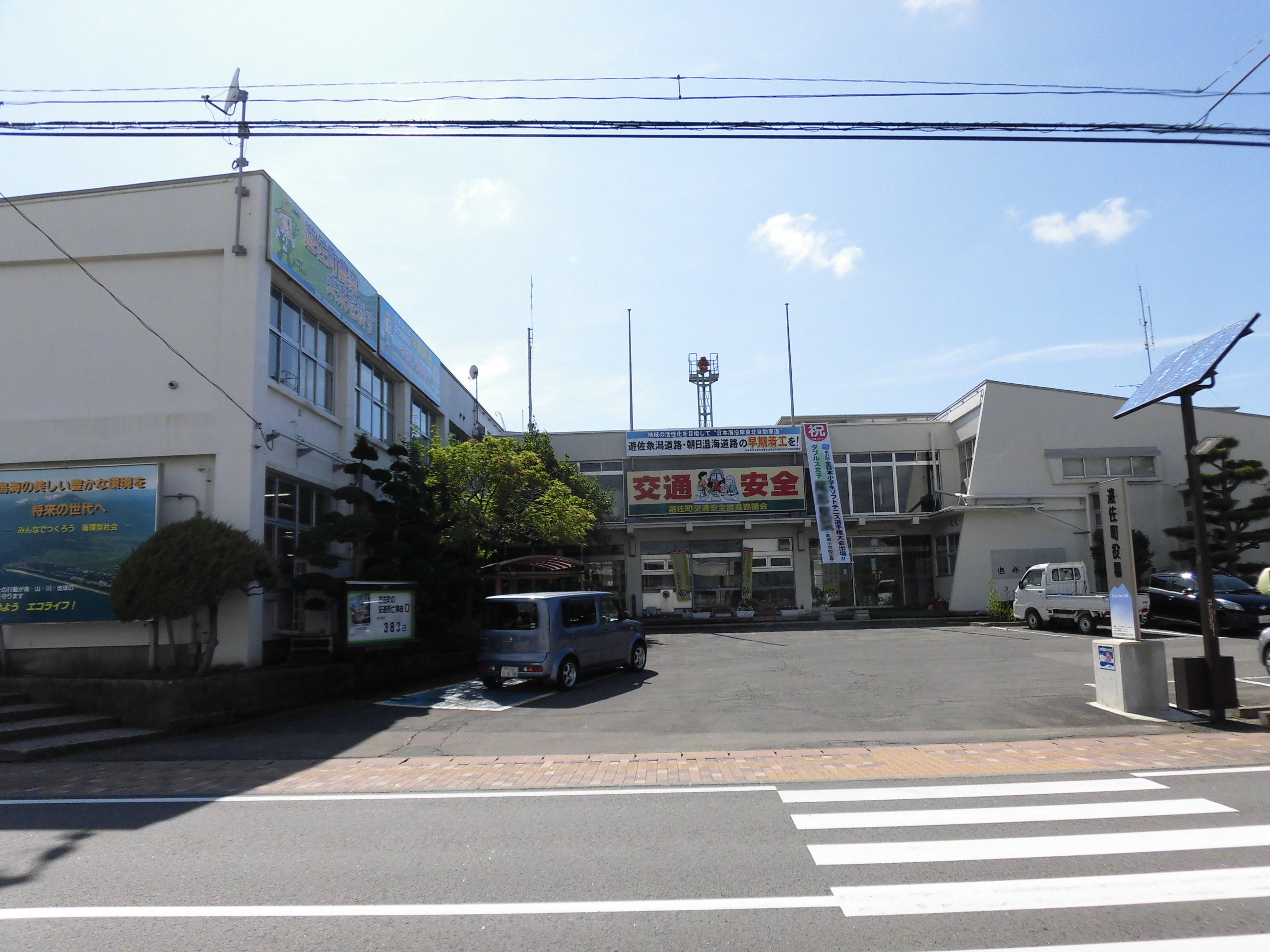 遊佐町役場。山形県飽海郡遊佐町遊佐に所在。